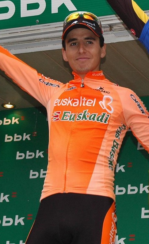 Igor Antón 2nd overall Euskal Bizikleta 2008.